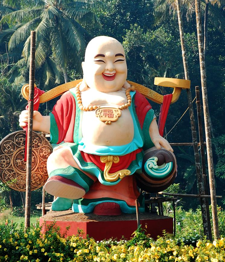 Malayalam